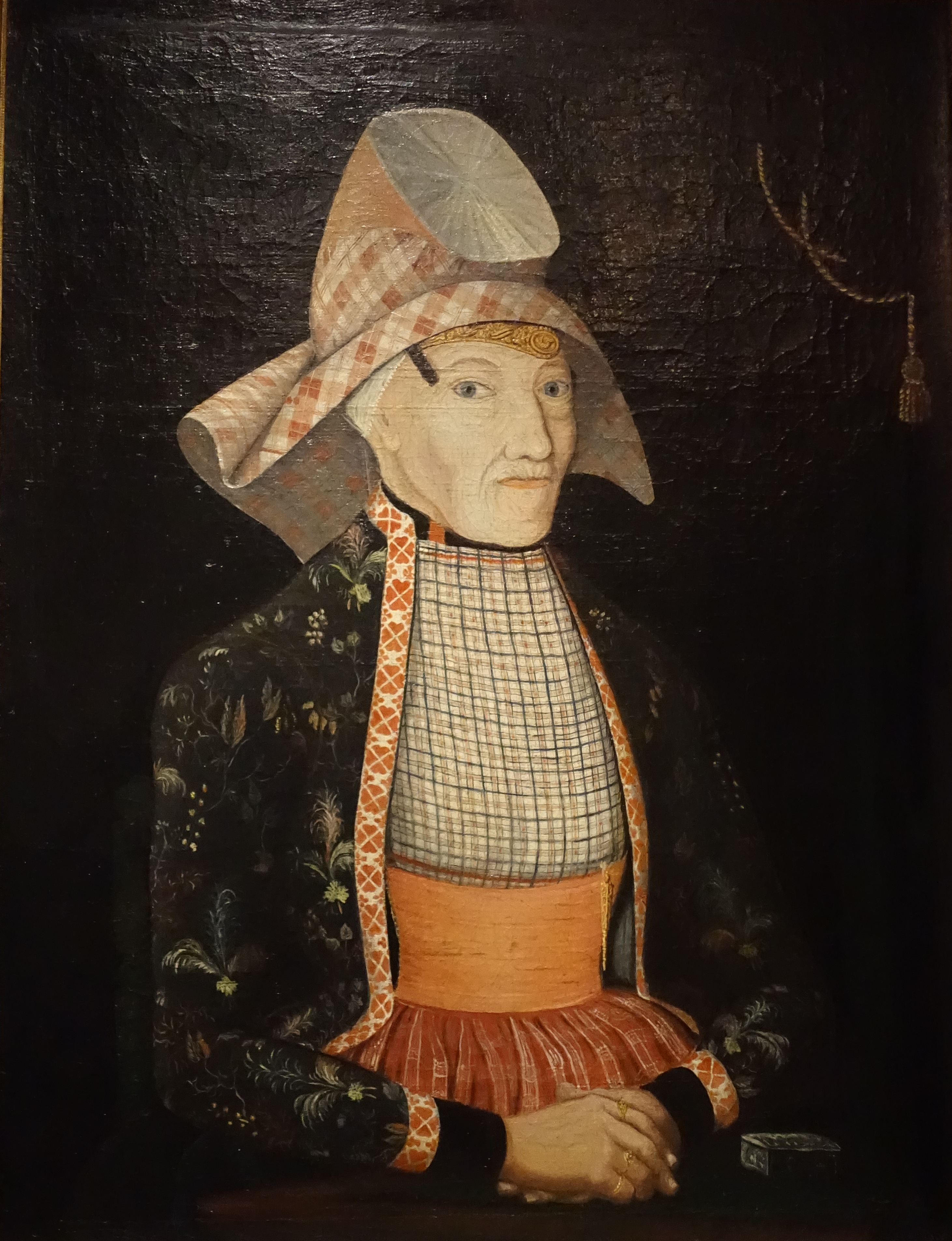 Streekdracht Hindloopen in Museum Hindeloopen